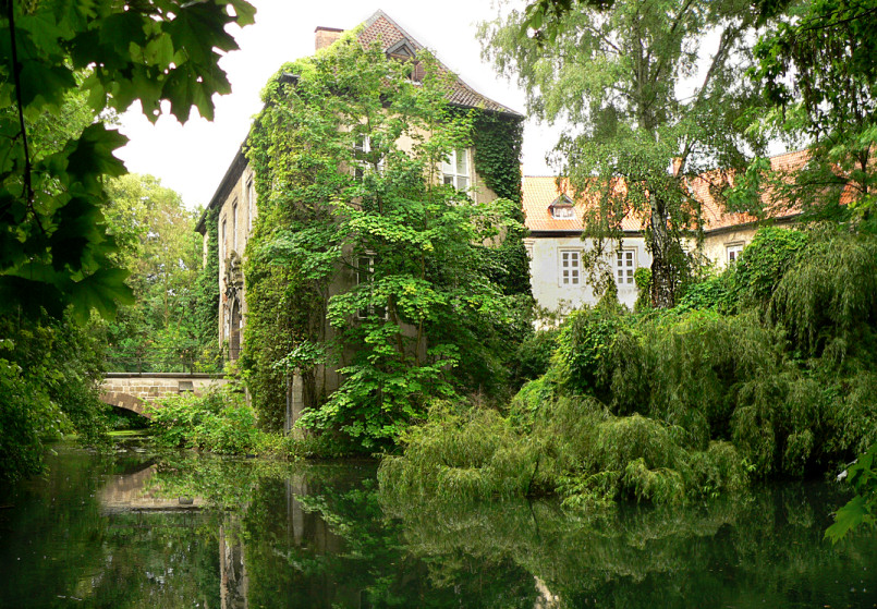 Wasserschloss Wendhausen, von Westen gesehen